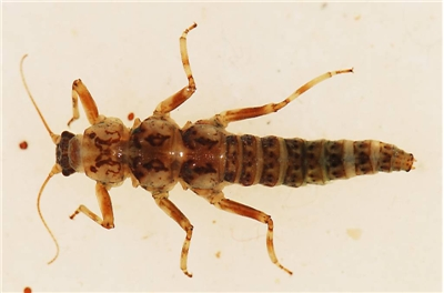 Патагонский дракон